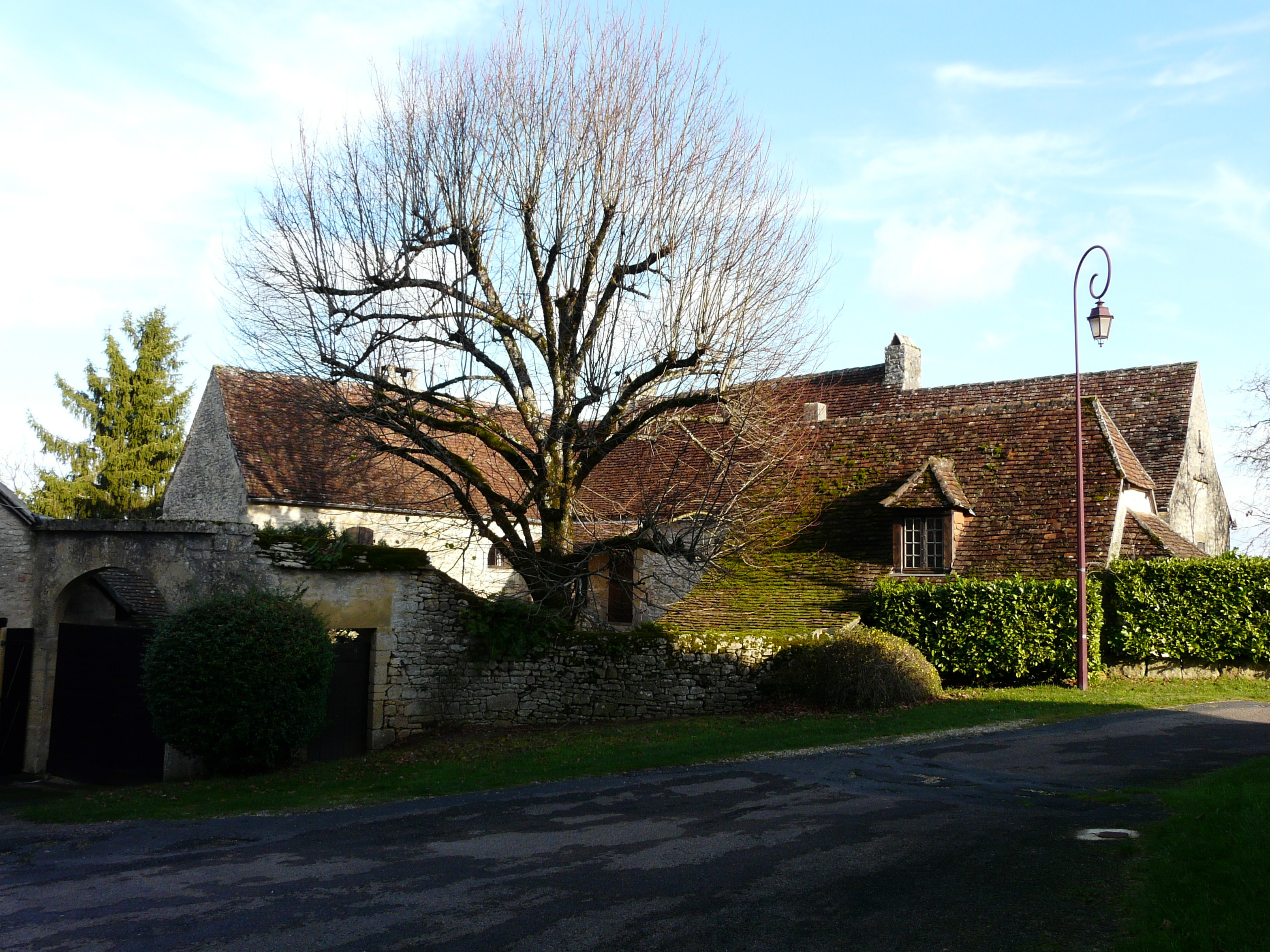 La maison du curé Bonnal (personnage du roman Jacquou le croquant), Fanlac, Dordogne, France.